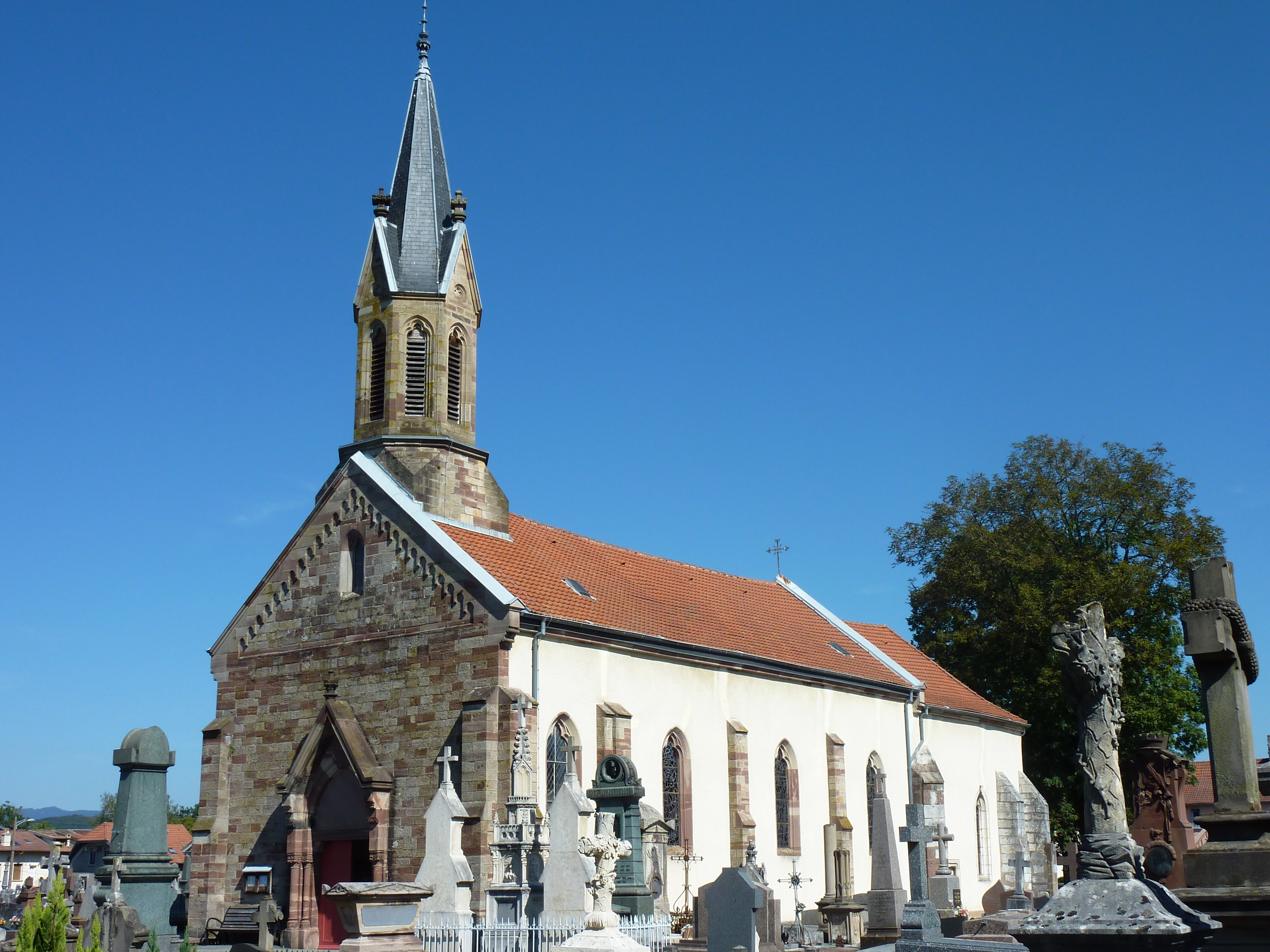 église de brasse de Belfort